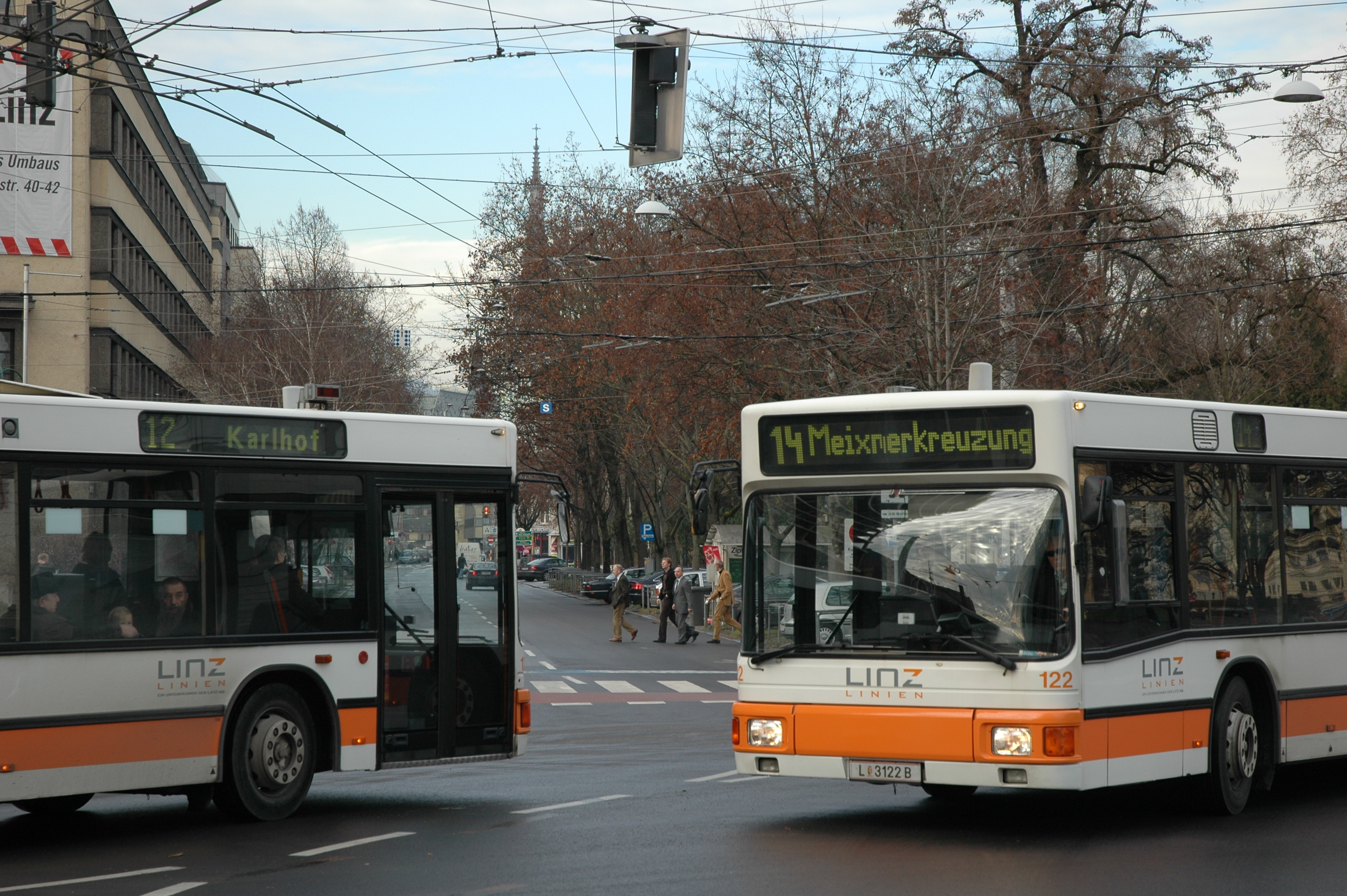 Busse der Linz AG (Linz Linien) in Linz an der Kreuzung zwischen Volksgarten und Landesdienstleistungszentrum